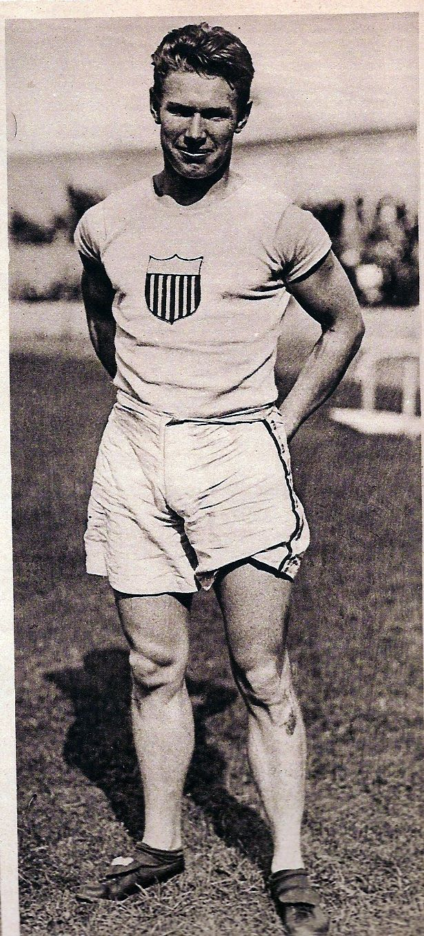 Charles Paddock, USA, champion olympique du 100 m en 1920 à Anvers. recordman du monde du 200 m en 1921 : 20" 4/5